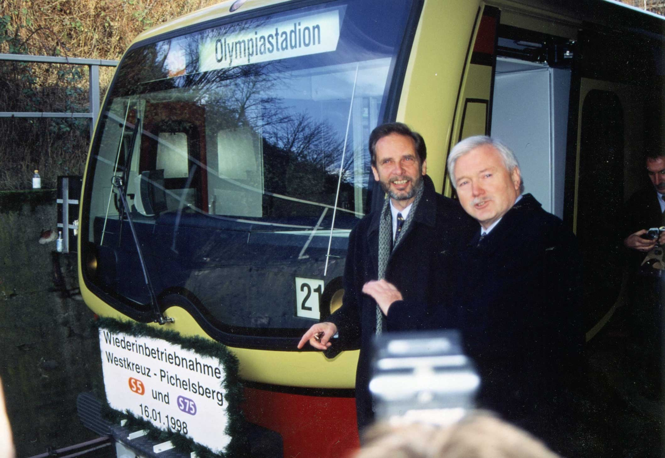 Wiedereröffnung der S-Bahn Berlin am Bahnhof Eichkamp (heute Messe Süd); fotografiert mit EXA Rheinmetall (Baujahr 1952) mit Meyer Optik Görlitz 3,5/35